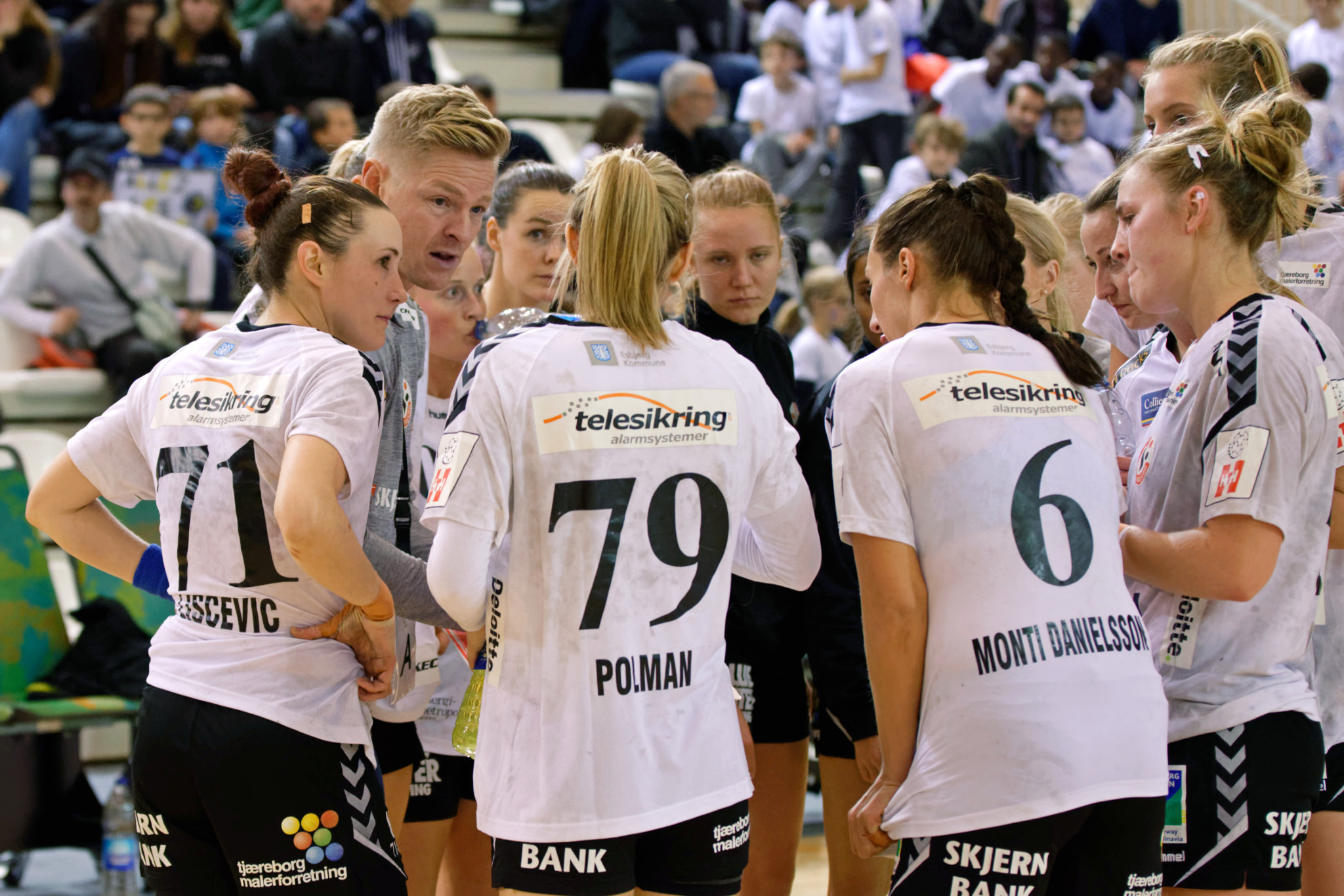 Lors de la rencontre du 3e tour de la Coupe EHF entre Paris 92 et les danoises de Team Esbjerg. A Issy les moulineaux, le 18 novembre 2018.